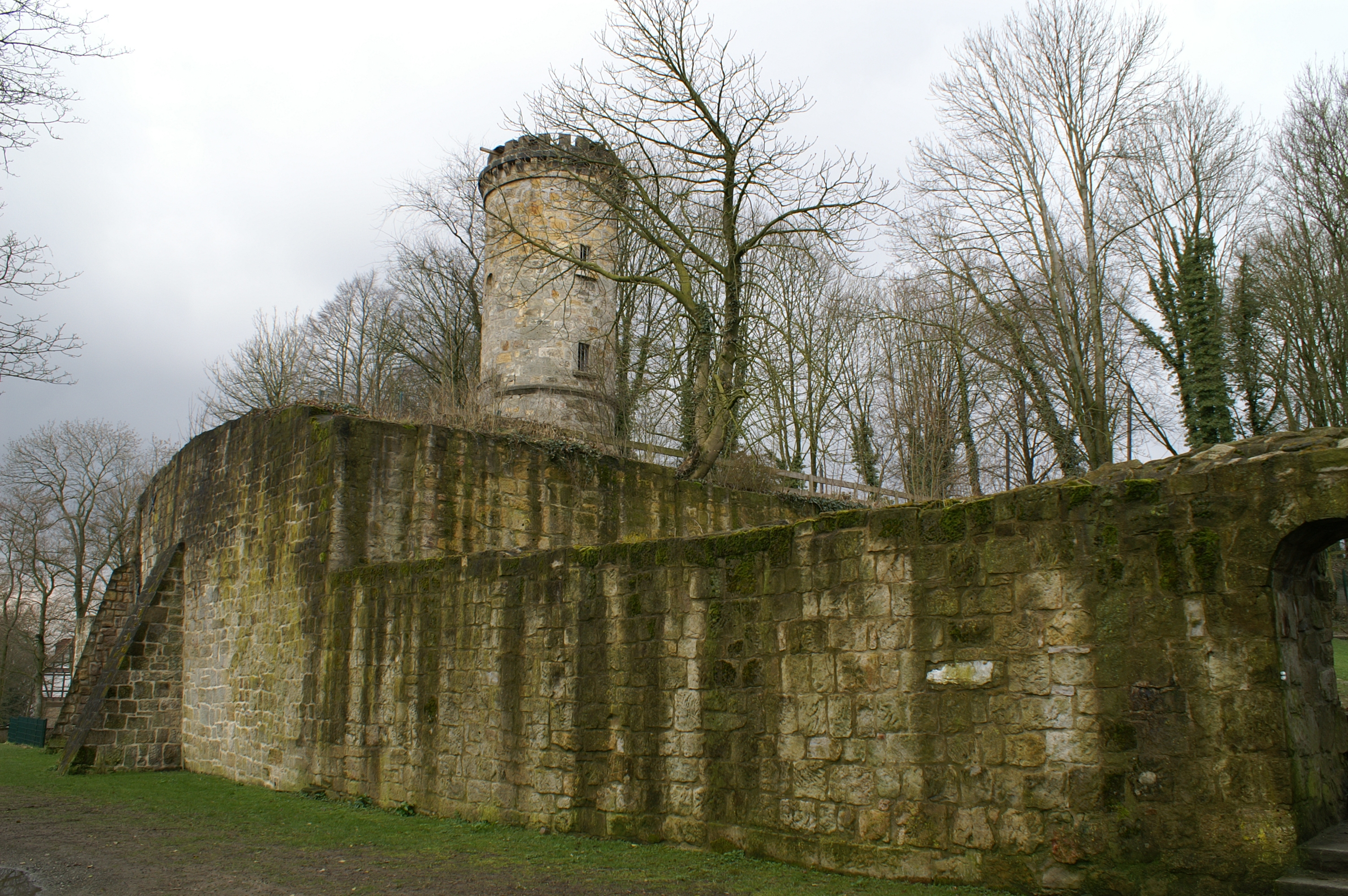 Wierturm auf der Burganlage in Tecklenburg, Nordrhein-Westfalen. This is a photograph of an architectural monument.